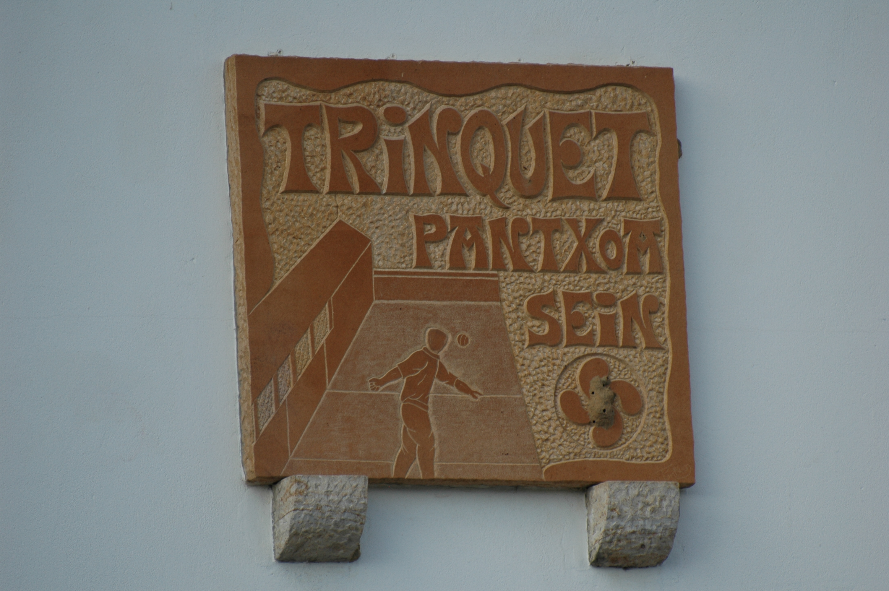 Ahetze, plaque du trinquet